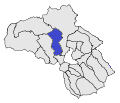 Mapa adaptat d'un mapa de lliure disposició